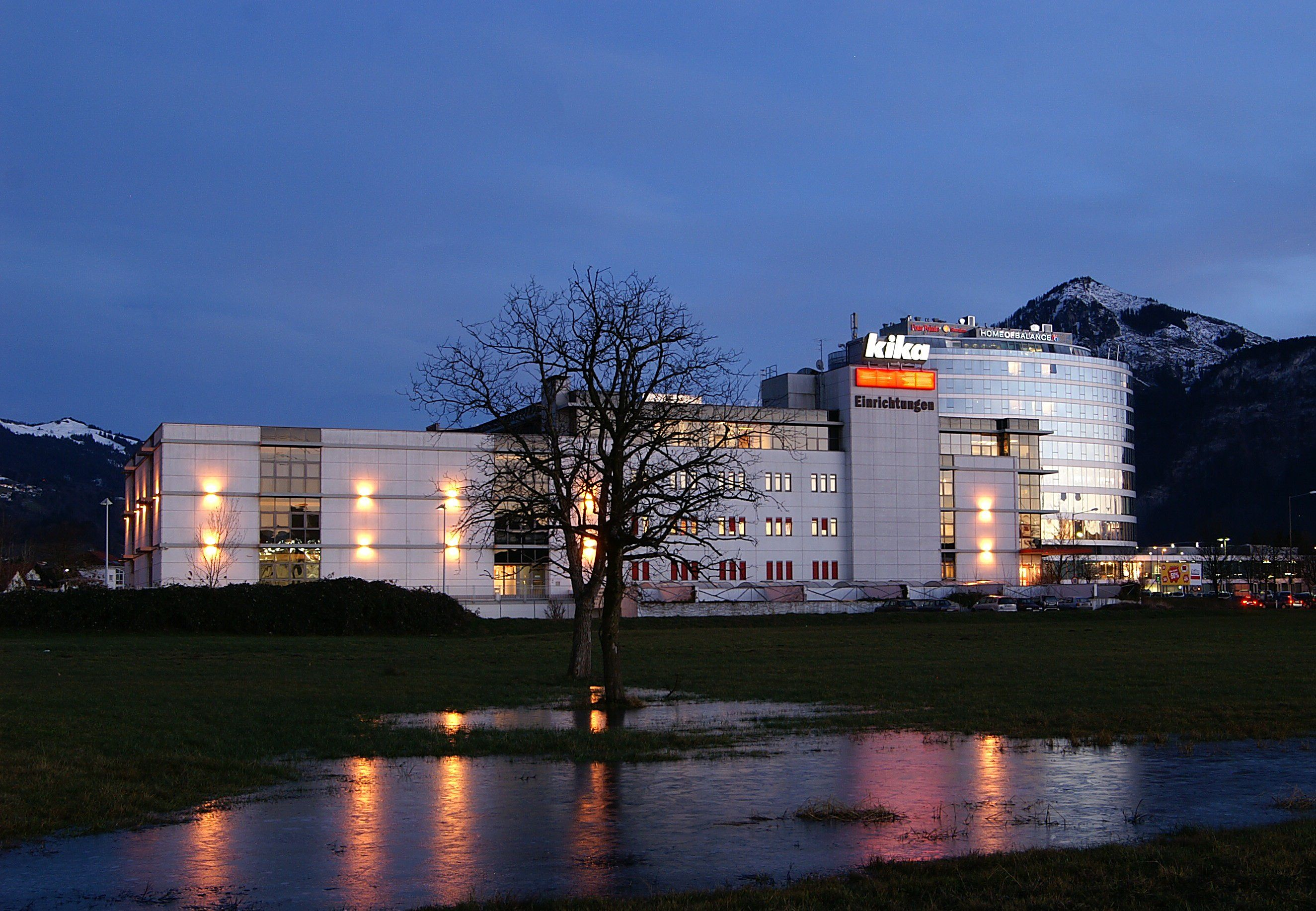 das Möbelhaus Kika in Dornbirn